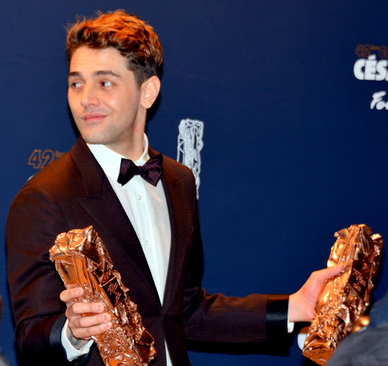 Xavier Dolan à la cérémonie des César